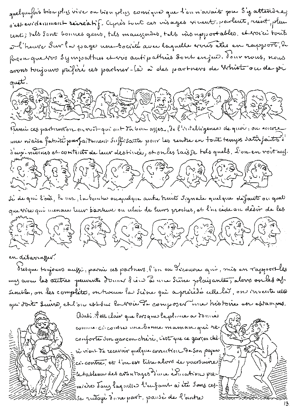 Page 13 de Essai de physiognomonie